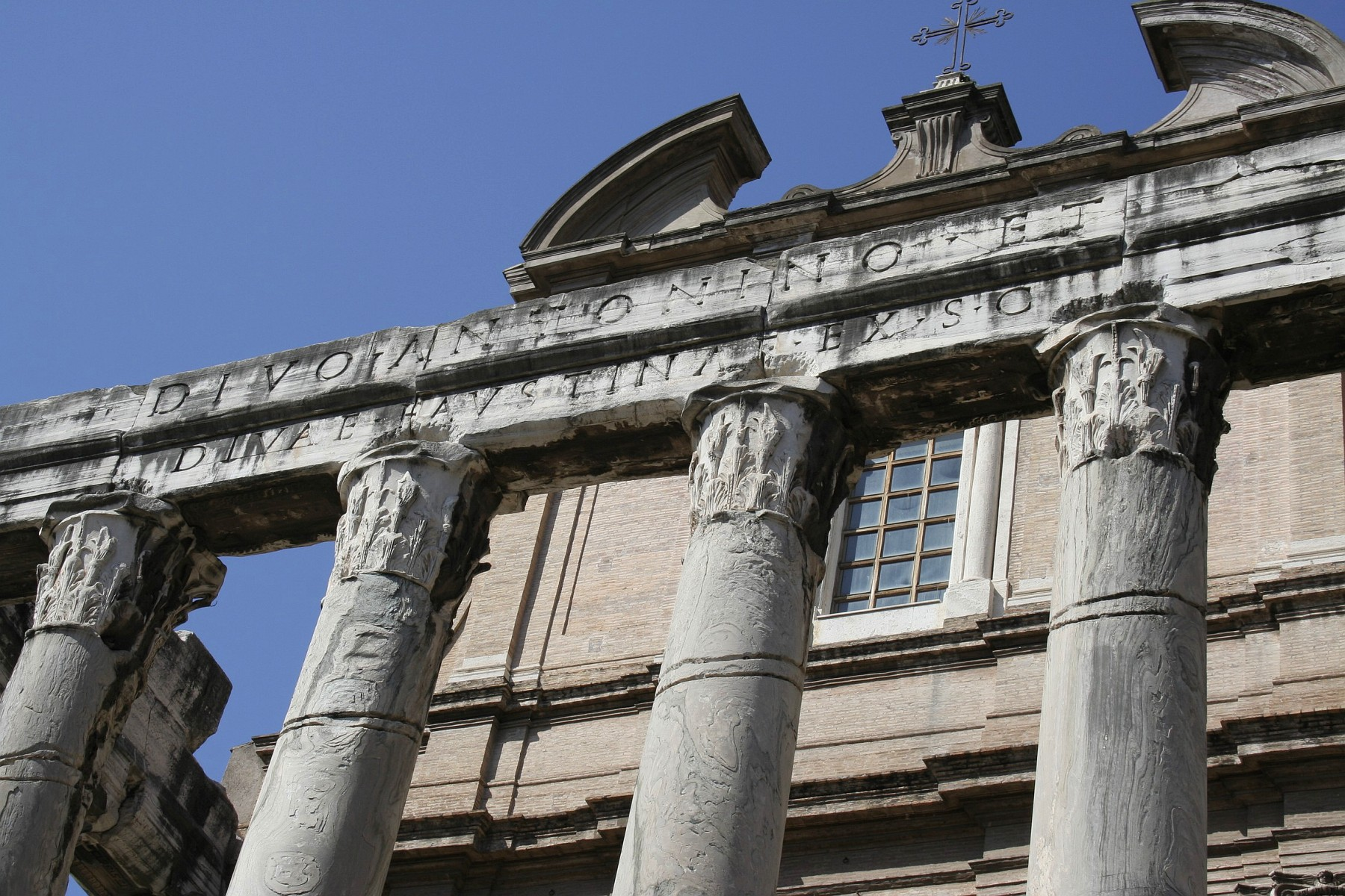 Inscription dédicatoire du temple d'Antonin et Faustine